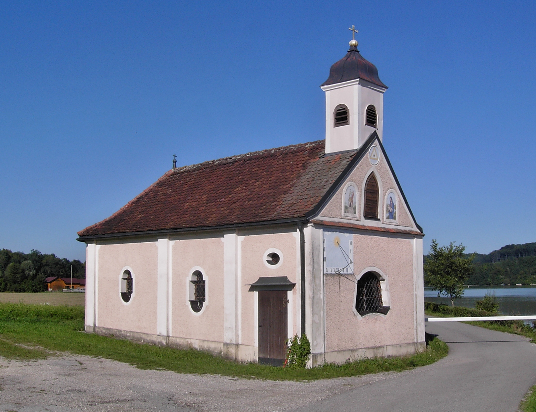 Steyr Rieplfeldstraße, Kapelle Maria Winkling, Südwestansicht